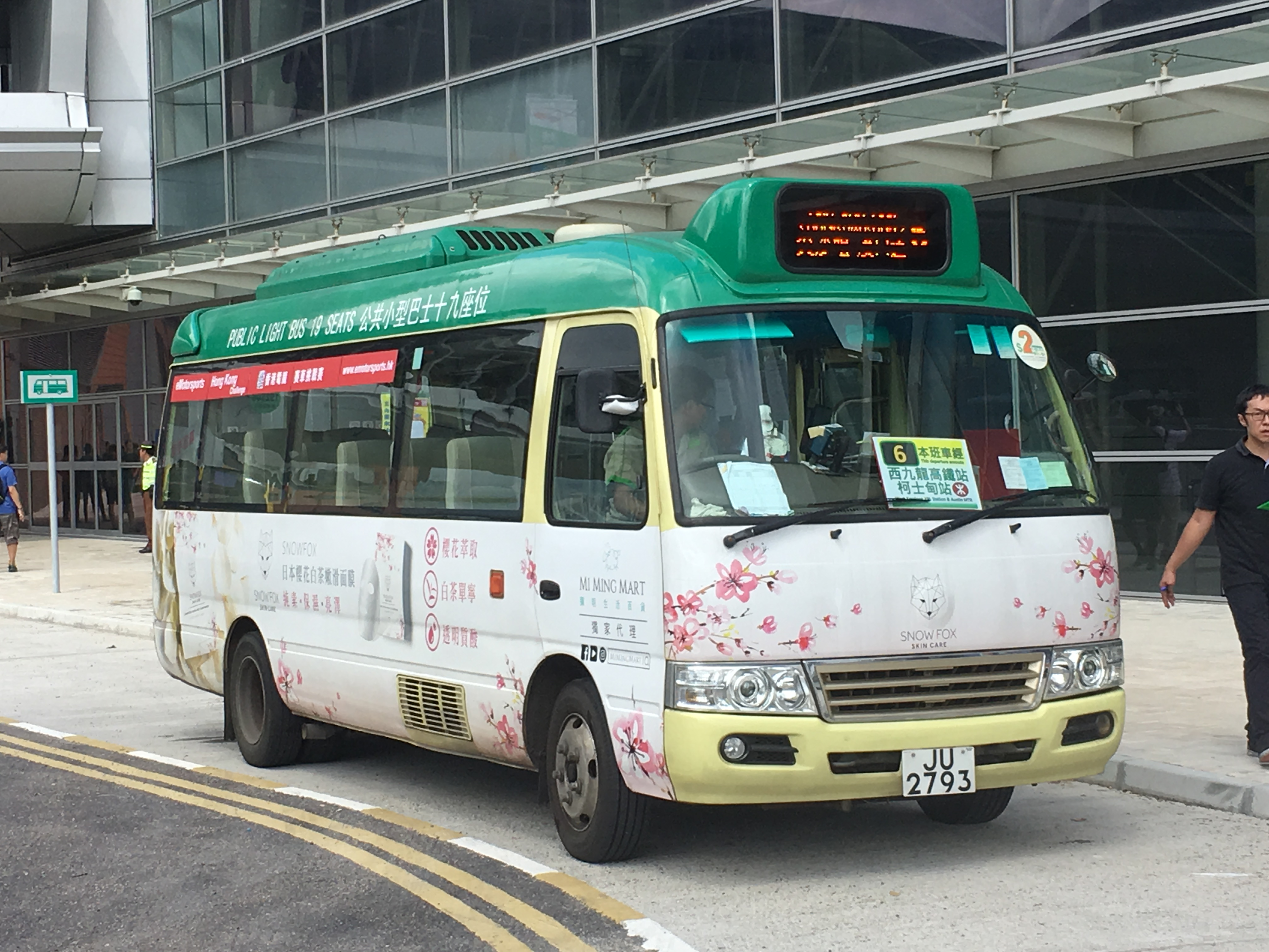 This photo is taken in West Kowloon Station.